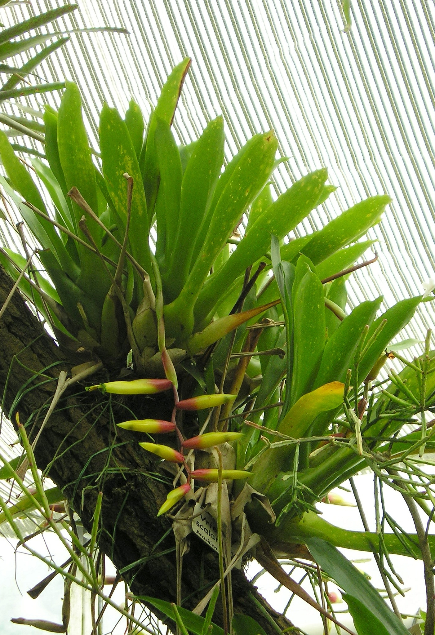 Flammendes Schwert (Vriesea scalaris) im Botanischen Garten TU Dresden